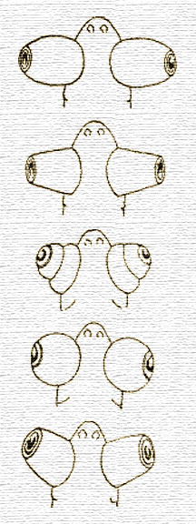 Разновидности глаз Телескопов. Иллюстрация из книги Н.Ф. Золотницкого (1851 – 1920 гг) “Аквариум любителя” En: Illustration from the book, NF Zolotnitsky (1851 - 1920 years) "Aquarium lover" De: Illustration aus dem Buch, NF Zolotnitsky (1851 - 1920 Jahre) "Aquarium-Liebhaber"